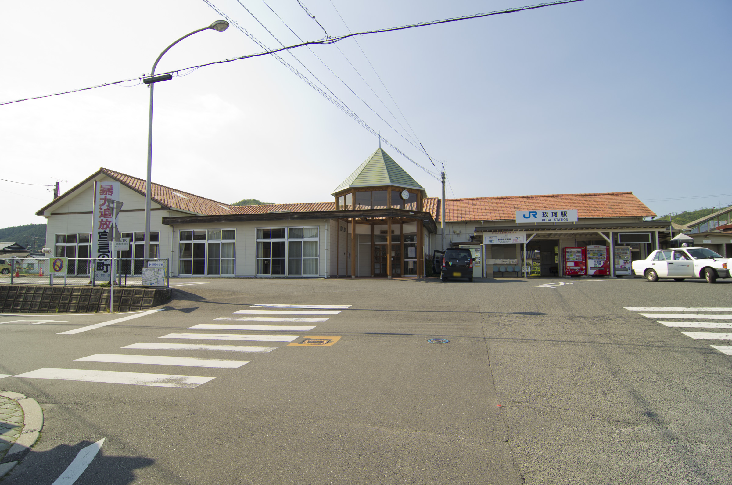 西日本旅客鉄道株式会社岩徳線玖珂駅